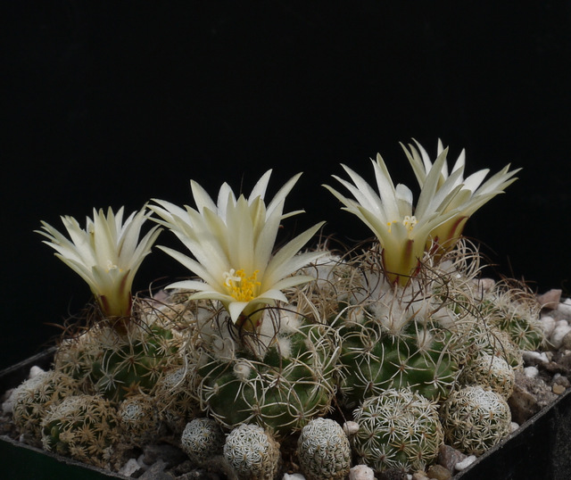 Turbinicarpus pseudomacrochele ssp. krainzianus, ex Frank in Blüte.